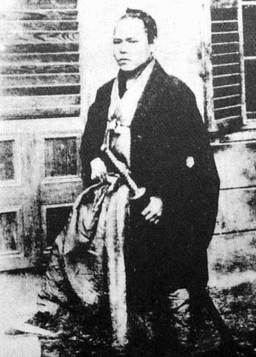 a Japanese man 香川敬三 (Keizo Kagawa)